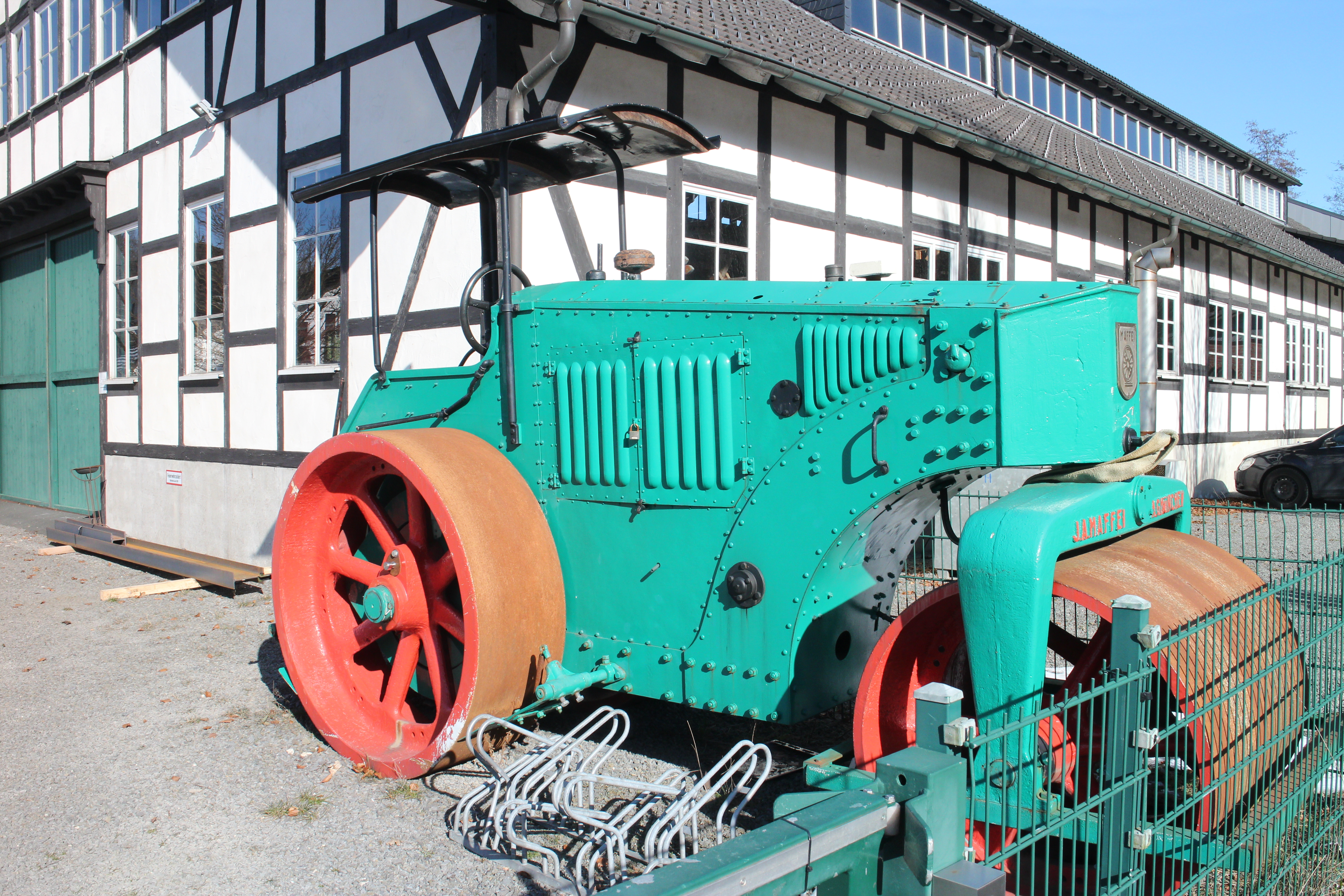 Dieselwalze der Firma KraussMaffei, Baujahr 1929. Die Walze ist Teil der Fahrzeugausstellung des Technikmuseum Freudenberg.